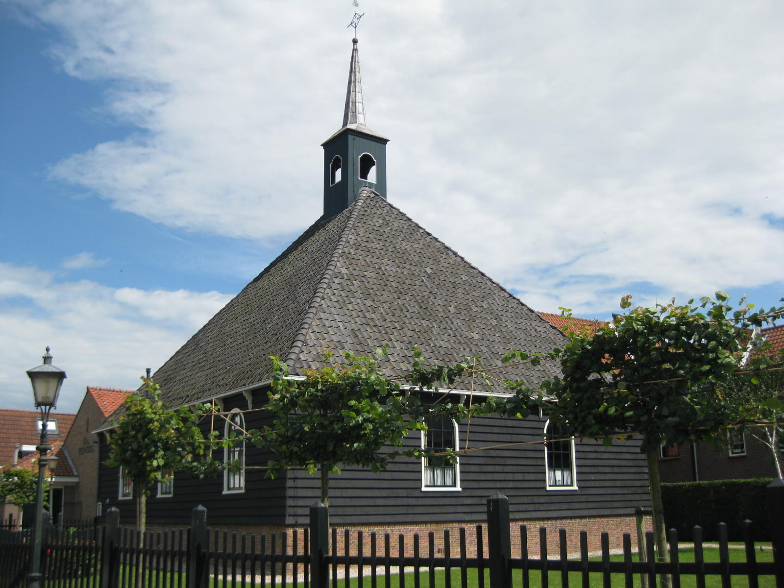 Stolphoevekerkje in Volendam, Nederland